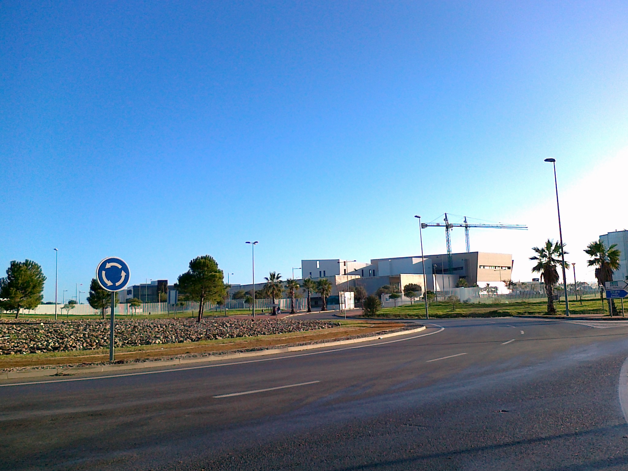 Entrada principal del Parque Tecnológico Agroindustrial de Jerez de la Frontera (Andalucía, España)